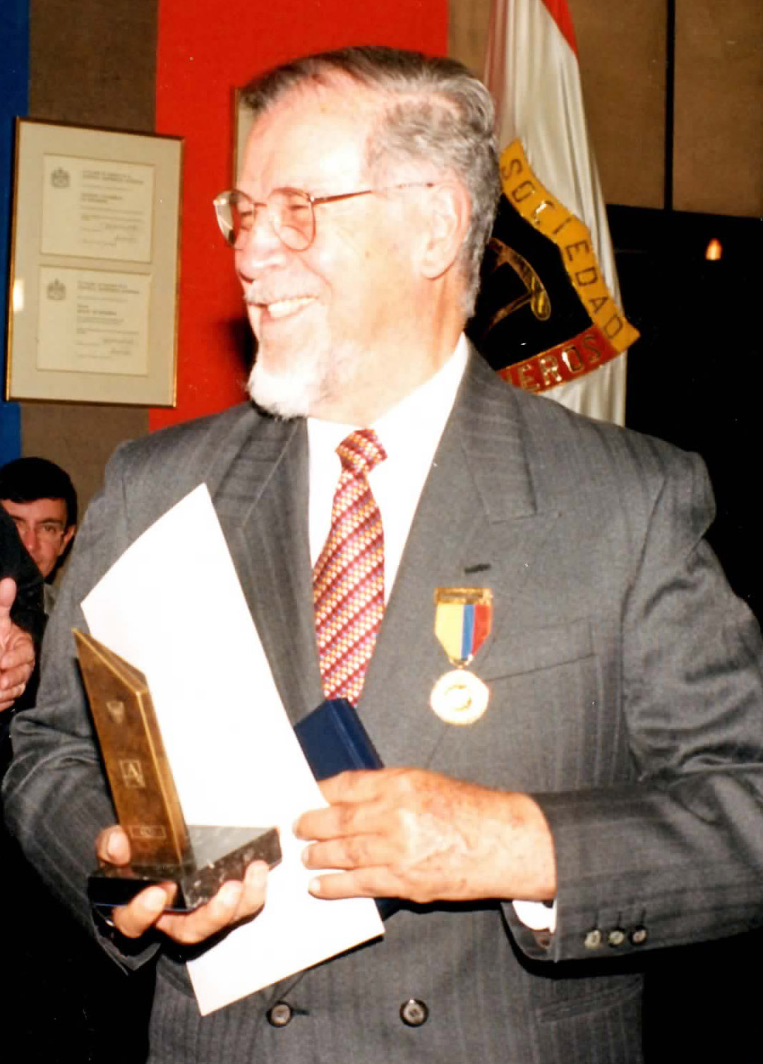 Foto del conocido arquitecto colombiano al recibir el prestigioso Premio José Gómez Pinzón en Bogotá en 2000